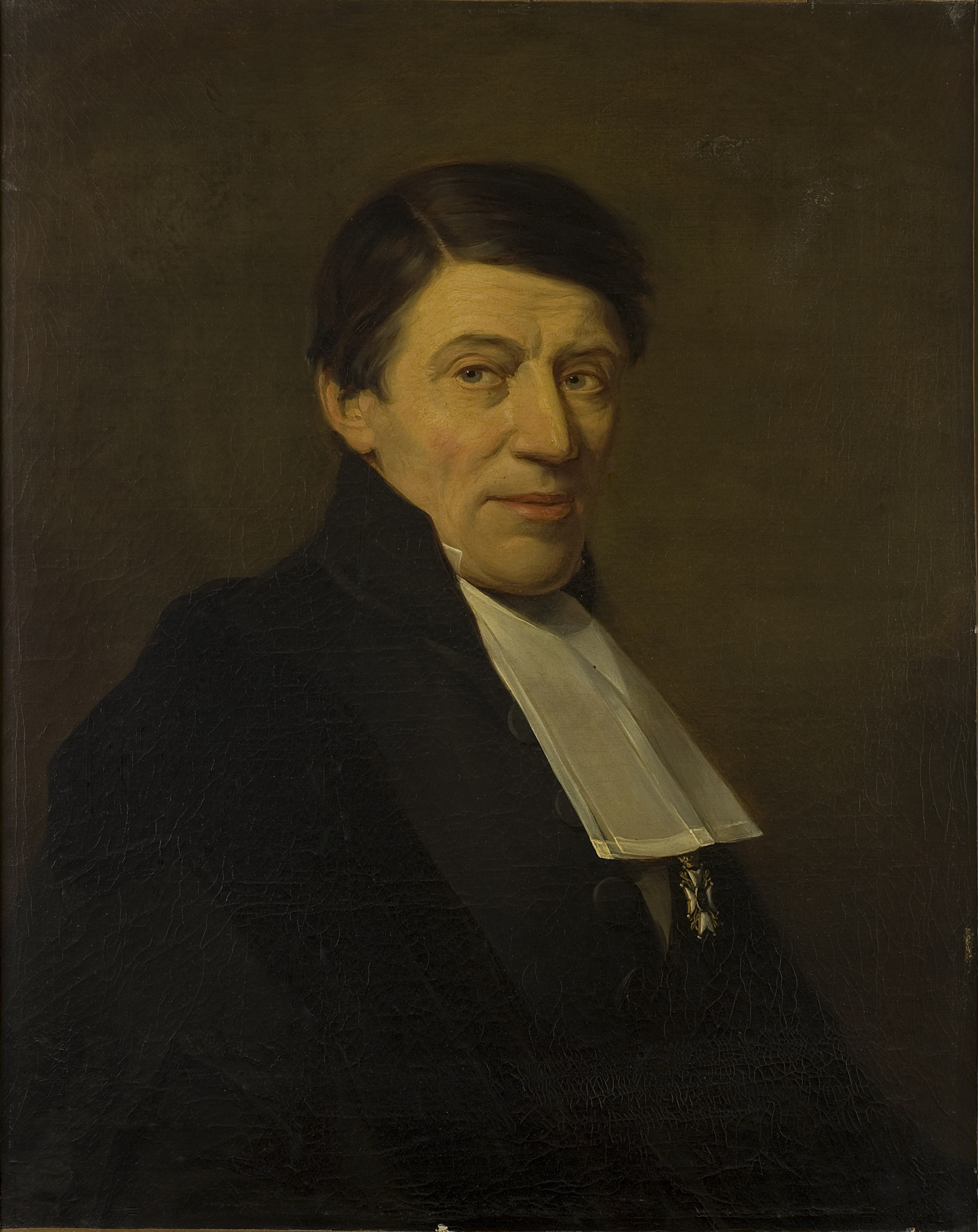 Portret van Hendrik Nienhuis.